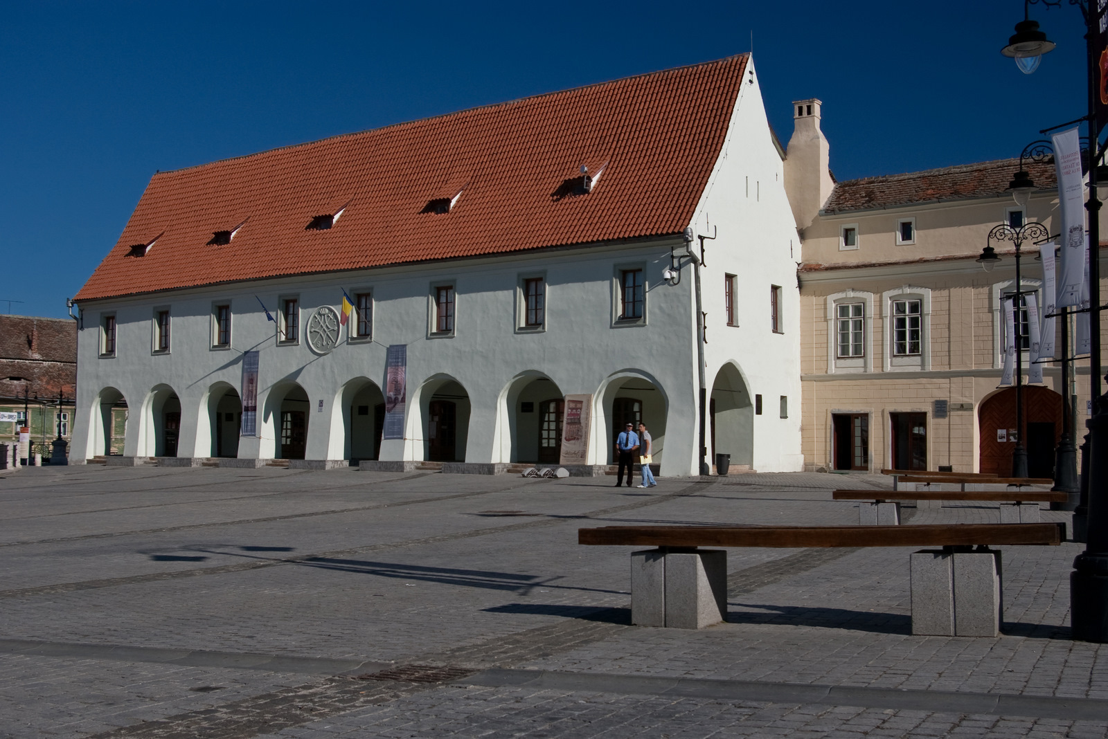 Fotografia prezinta Casa Artelor din Sibiu, vazuta dinspre Piata Mica.